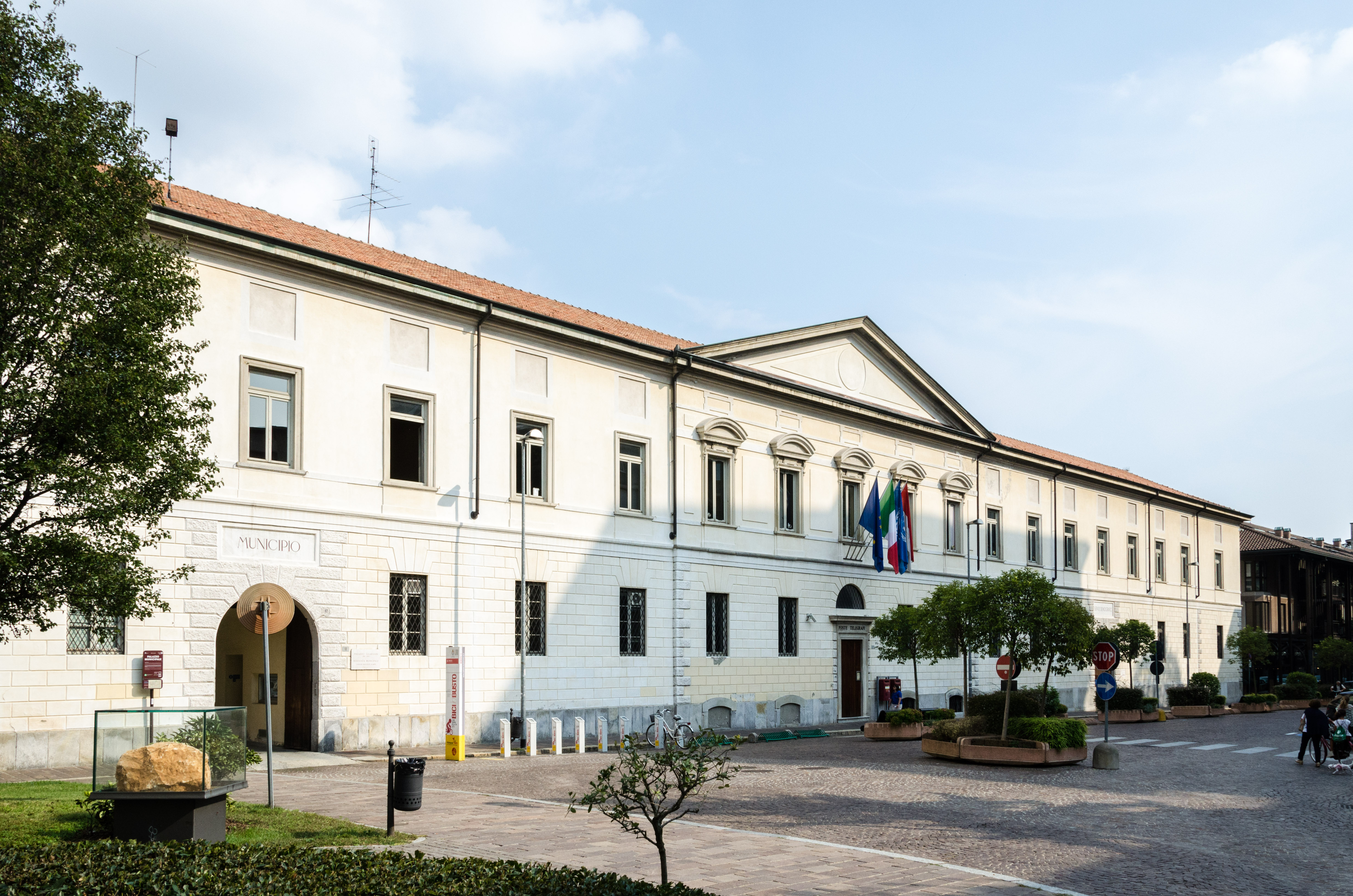 Palazzo Gilardoni - Municipio ID 0120265114 This is a photo of a monument which is part of cultural heritage of Italy.